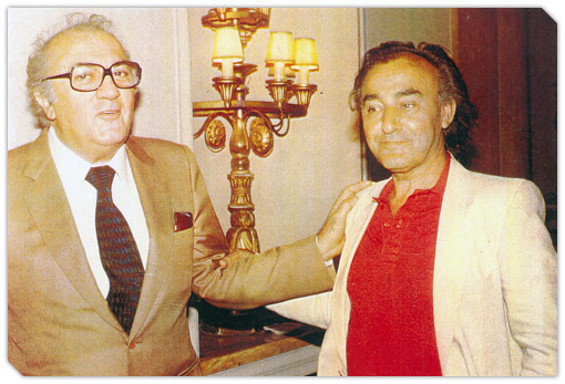 Elena d'agostini, archivi personale, 2009, Pubblico dominio